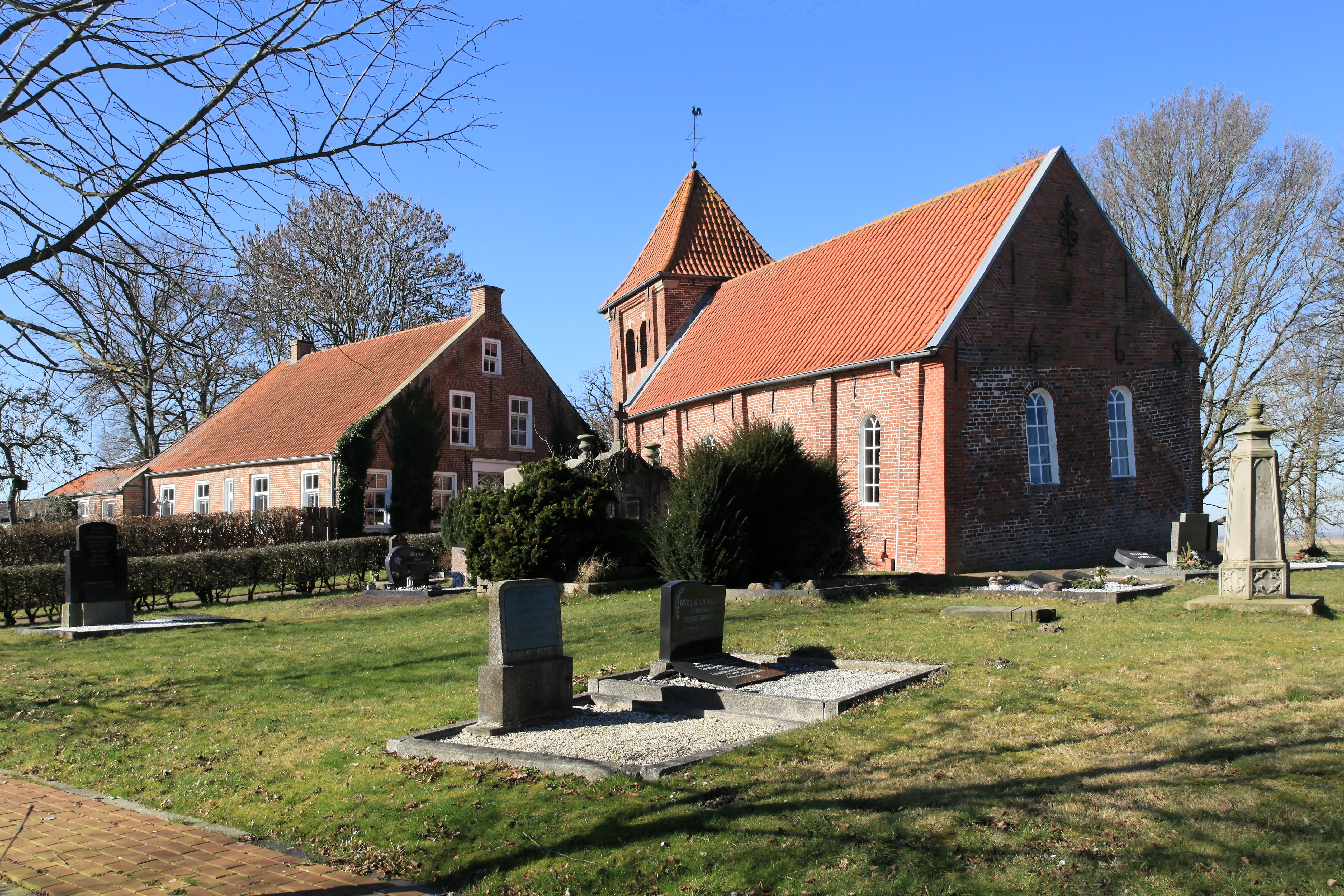 Friedhof, St.-Maria-Kirche und Marienchor 23, ehemaliges Pfarrhaus in Marienchor, Jemgum